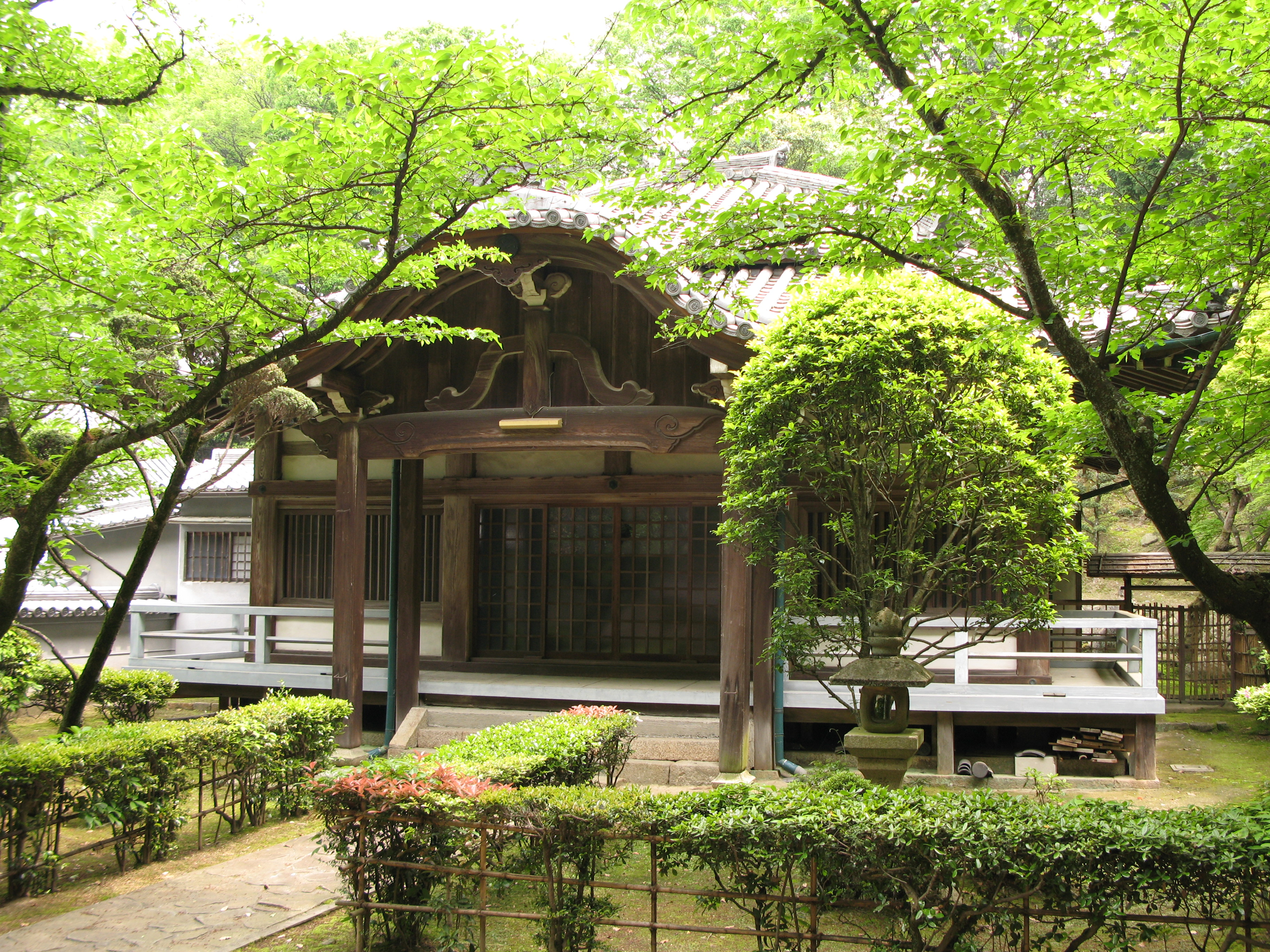 Anpukuji in Kashiwara, Osaka, Japan